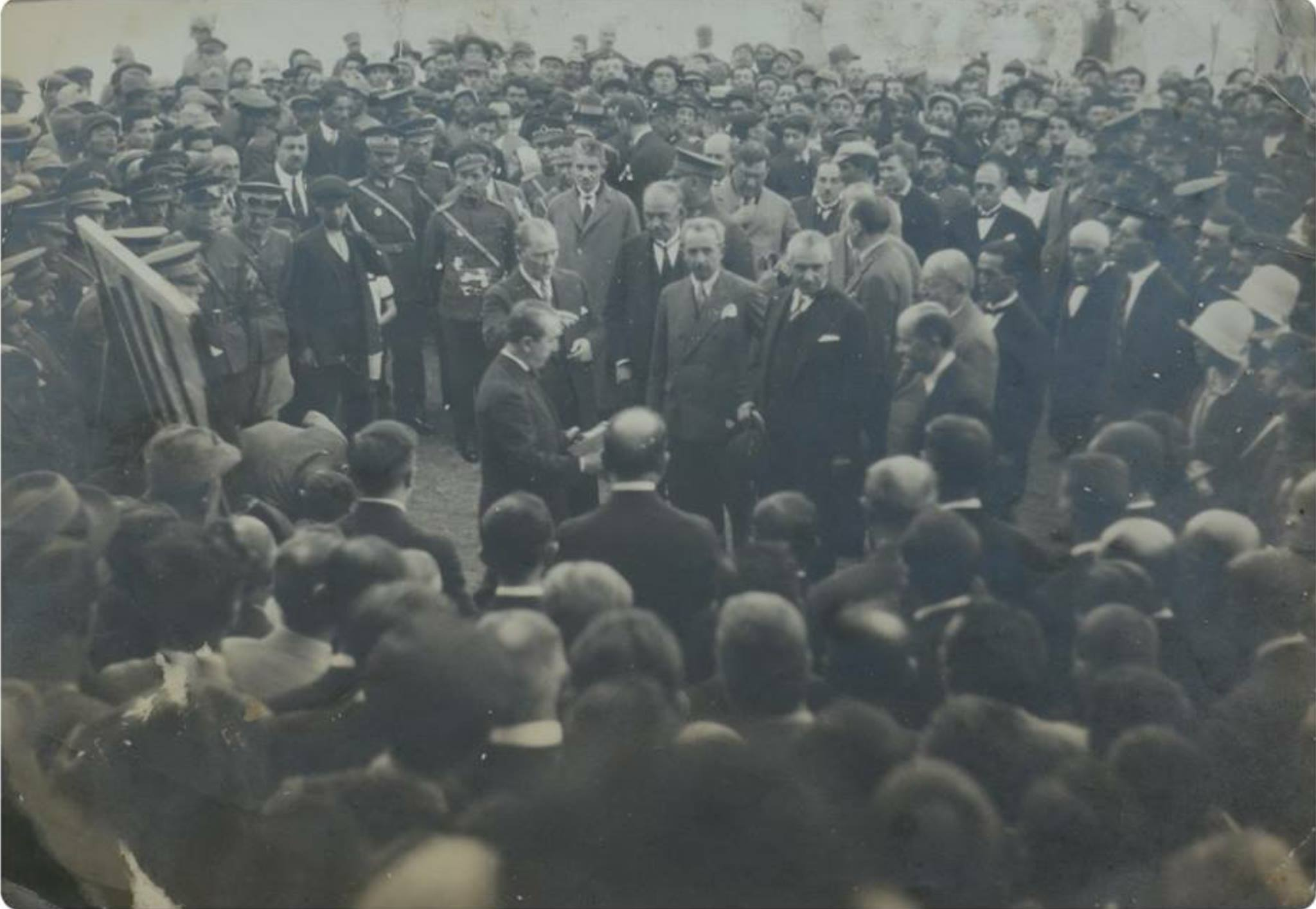 Atatürk İstanbul dönüşü Ankara'da karşılanıyor.